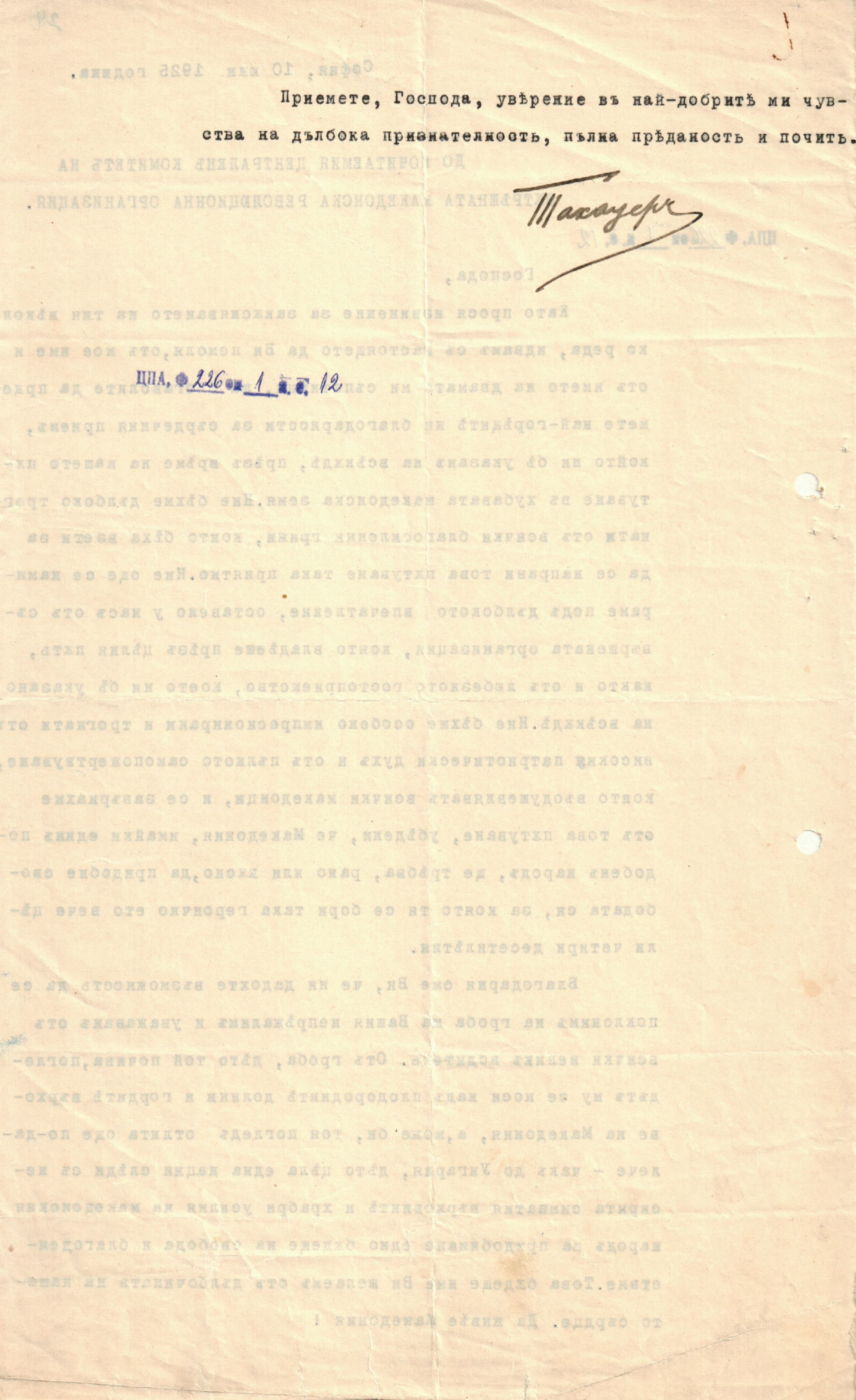 Писма от лица и ВМРО до ЦК и ЗП на ВМОРО за връзки с гръцки четници по време на Илинденското въстание, организирането на чети от Герджиков(ич) в Сърбия; връзки между ВМОРО и арменската революционна организация „Дашнакцутюн“, събиране на федеристи и комунисти в читалище „Гоце Делчев“ в София; дейността на П. Шатев, М. Герджиков и Спиро Василев сред емиграцията в Цариград; разпределяне работата в пунктовете и др.